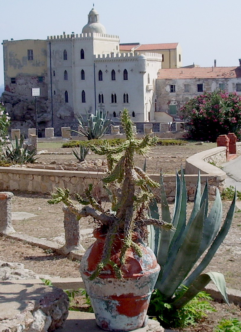 Il Palazzo della Specola visto dal giardino del Forte Teglia sull'Isola di Pianosa (LI)